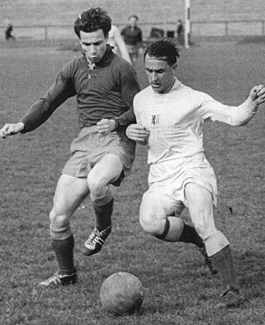 Title: DDR Auswahl - Stadtauswahl Leipzig Factual corrections and alternative descriptions are encouraged separately from the original description. Additionally errors can be reported at this page to inform the Bundesarchiv. Original historic description: Zentralbild-Funkbild Fu-Non 27.3.1957 DDR Auswahl - Stadtauswahl Leipzig - Für das Fußball-Länderspiel mit der Türkei am 7.4.1957 in Istanbul, bestritten die DDR-Auswahlspieler heute (27.3.1957) im Leipziger Bruno Plache-Stadion ein Übungsspiel, gegen eine Stadtauswahl von Leipzig. UBz: Ein Zweikampf zwischen dem Auswahlstürmer Schröter (links) und dem Leipziger Abwehrspieler Konzack.